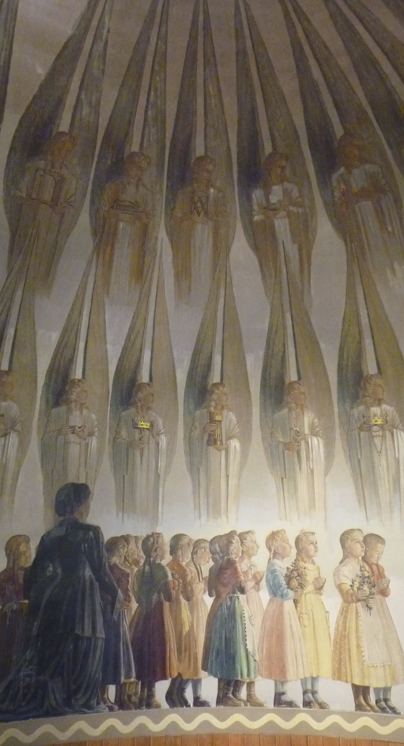 Detall de l'absis de la capella de la Mare de Déu de Montserrrat d'Igualada